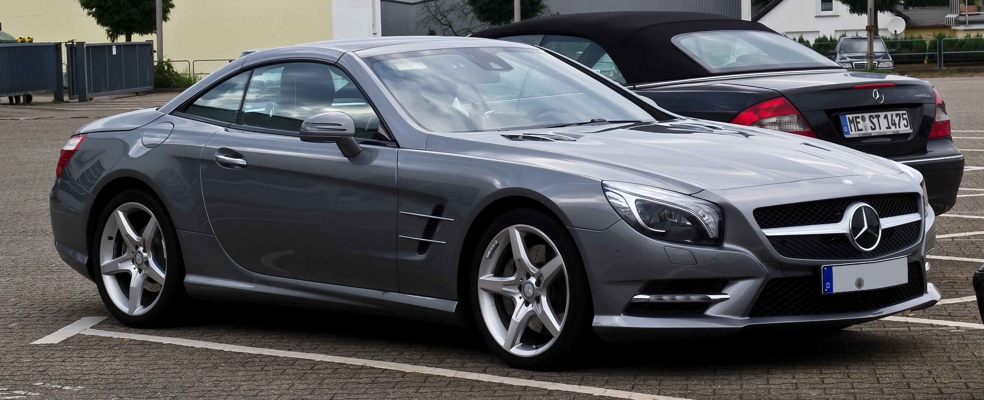 Mercedes-Benz SL 500 BlueEFFICIENCY Sport-Paket AMG (R 231)